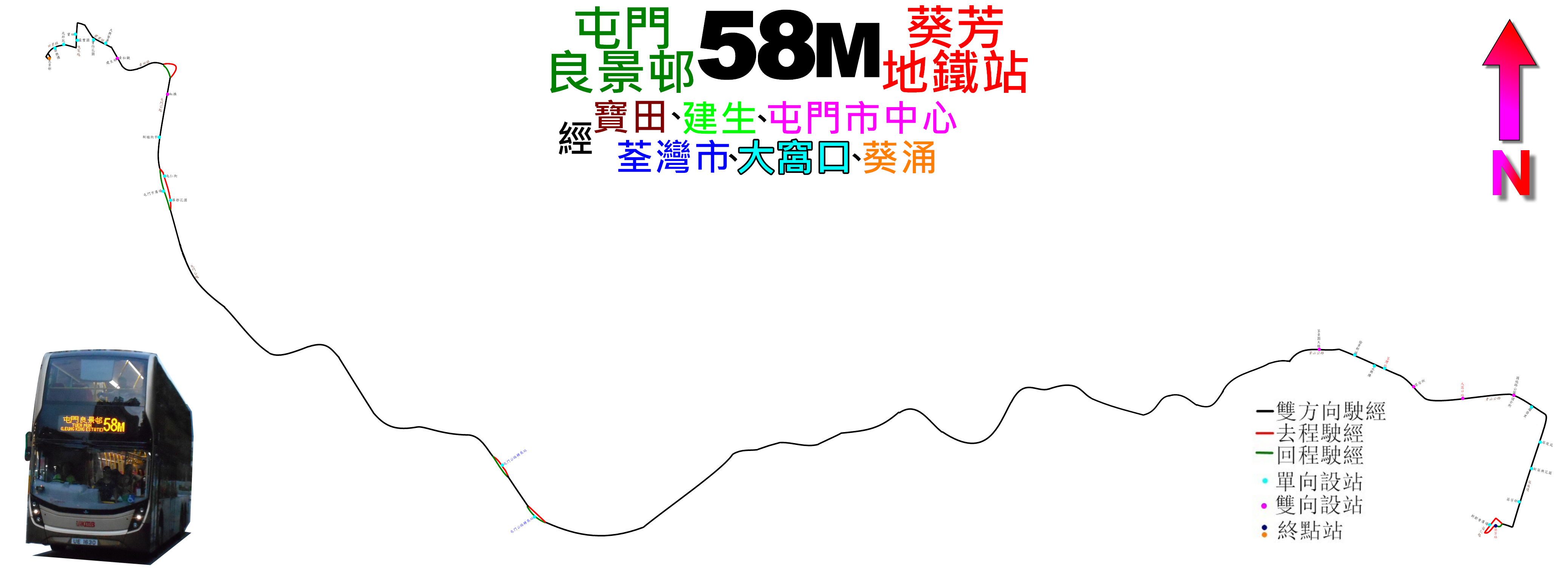 中文（香港）: 九巴58M線的走線圖